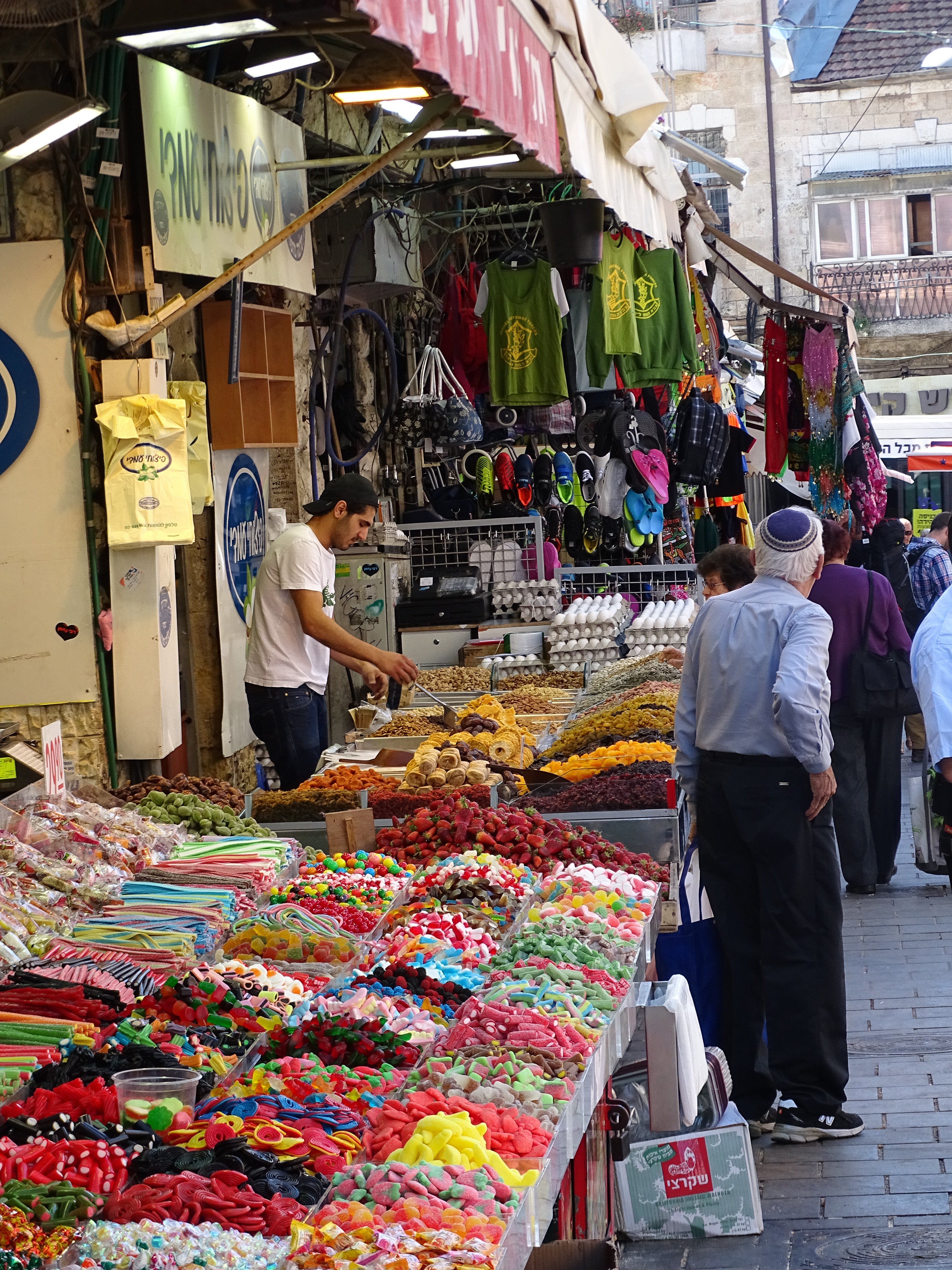 Mahane Yehuda Market, Angebote